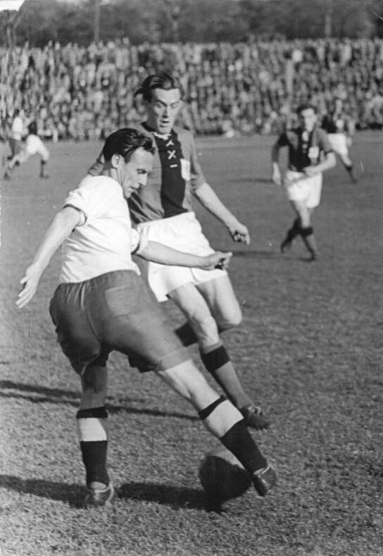 Zentralbild-Wlocka Str-Sta. 13.10.1953 5. Oberliga-Punktspiel zwischen Rotation Dresden und Turbine Erfurt - Am 11.10.1953 fand im Georg-Dimitroff-Stadion in Erfurt das 5. Oberliga-Punktspiel dieser Saison statt. 25.000 Zuschauer erlebten einen knappen aber verdienten Sieg ihrer Turbine-Elf über die technisch hervorragend spielende Rotationself aus Dresden. Das Spiel endete 1:0 für Erfurt. UBz: Der Erfurter Läufer Jochen Müller im Zweikampf mit dem Halbrechten Vogel aus Dresden. Der lange Jochen schaltete seinen Gegenspieler Vogel in zahlreichen Zweikämpfen aus (Vogel am Ball).